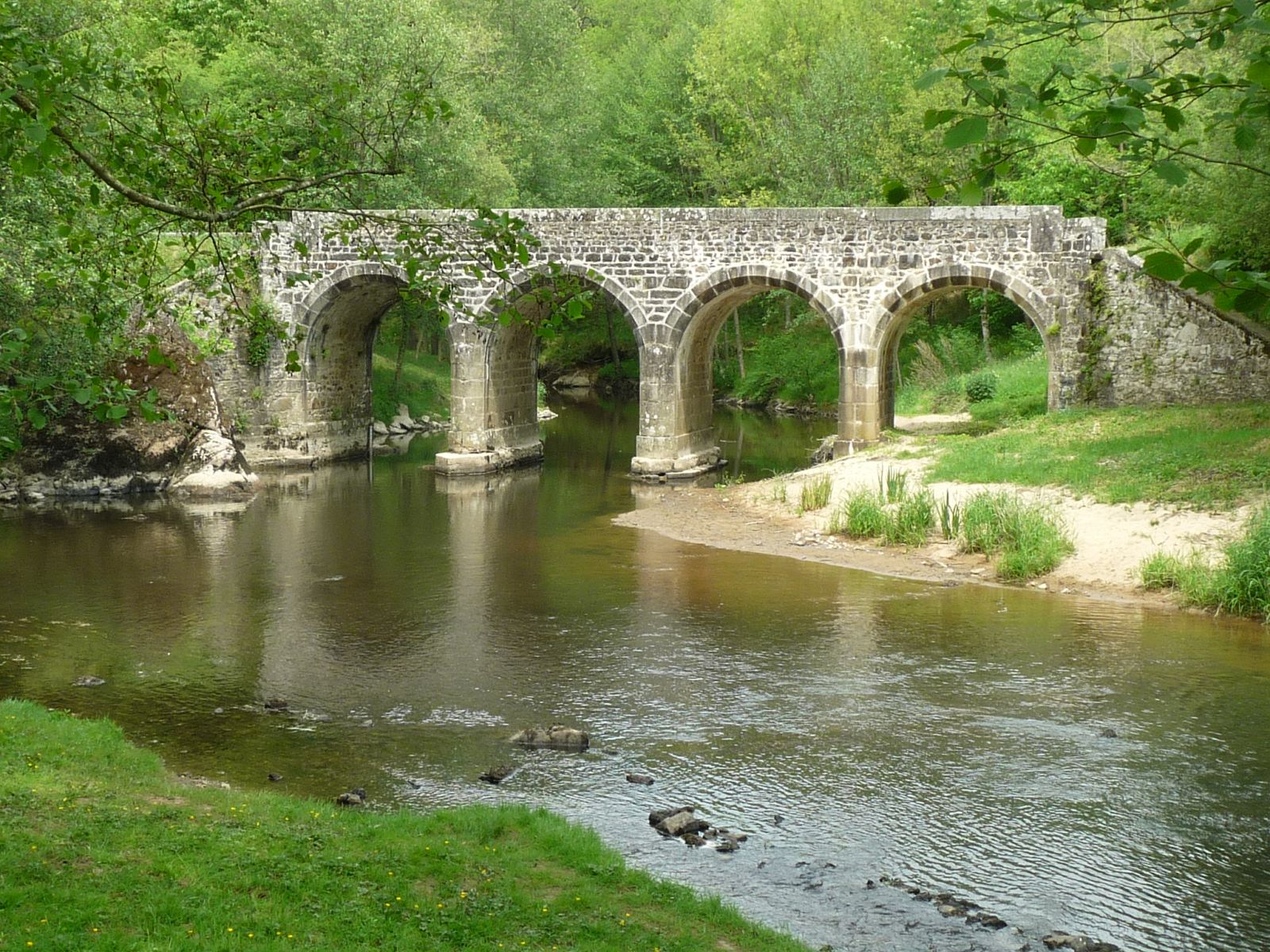 L'Issoire et le pont Binot au sud de Brillac, Charente, France